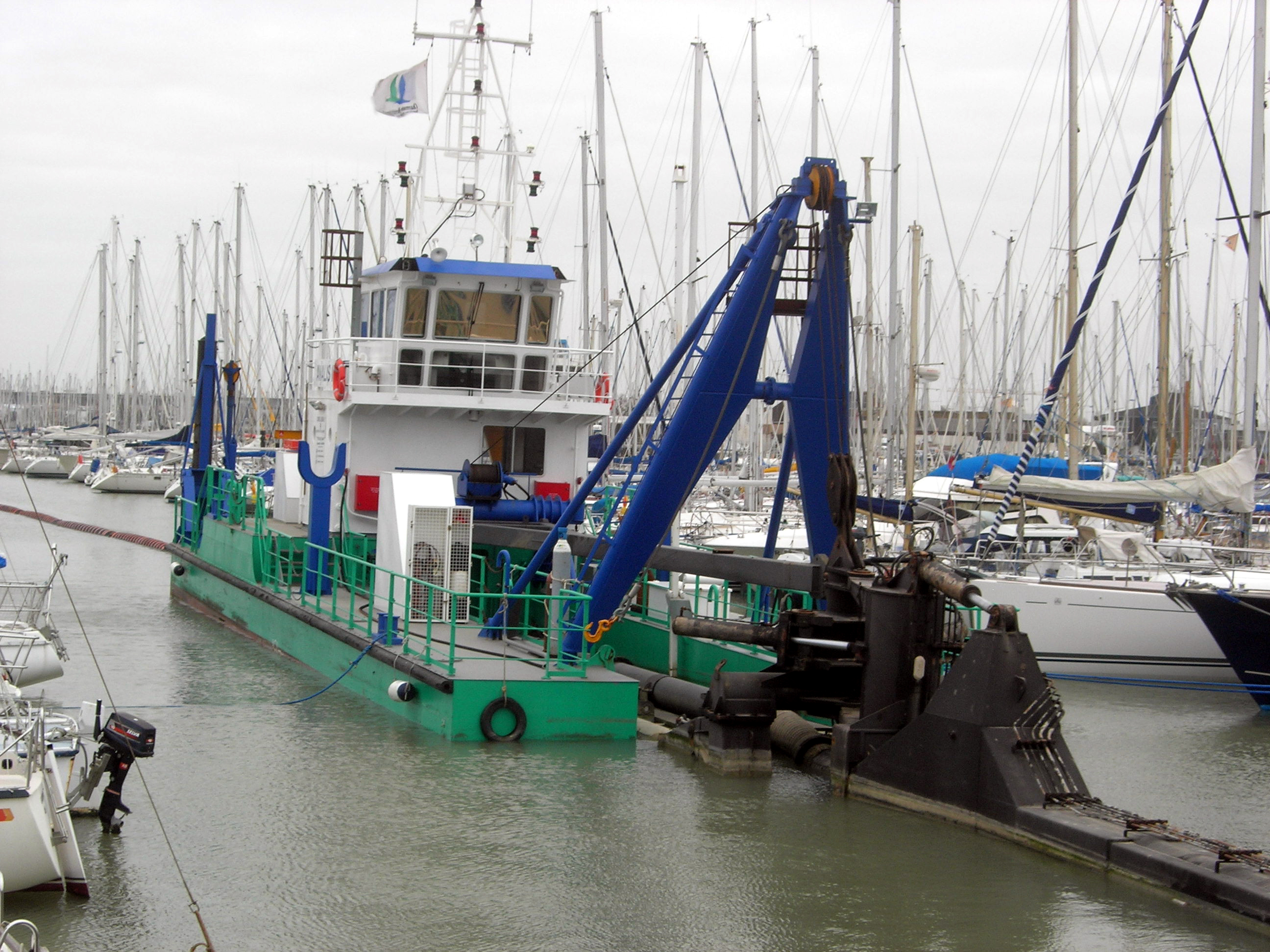 Description =Avalis II dans le port des Minimes à la Rochelle Source =Photo taken by Remi Jouan Date =Janvier 2007 Author =Remi Jouan